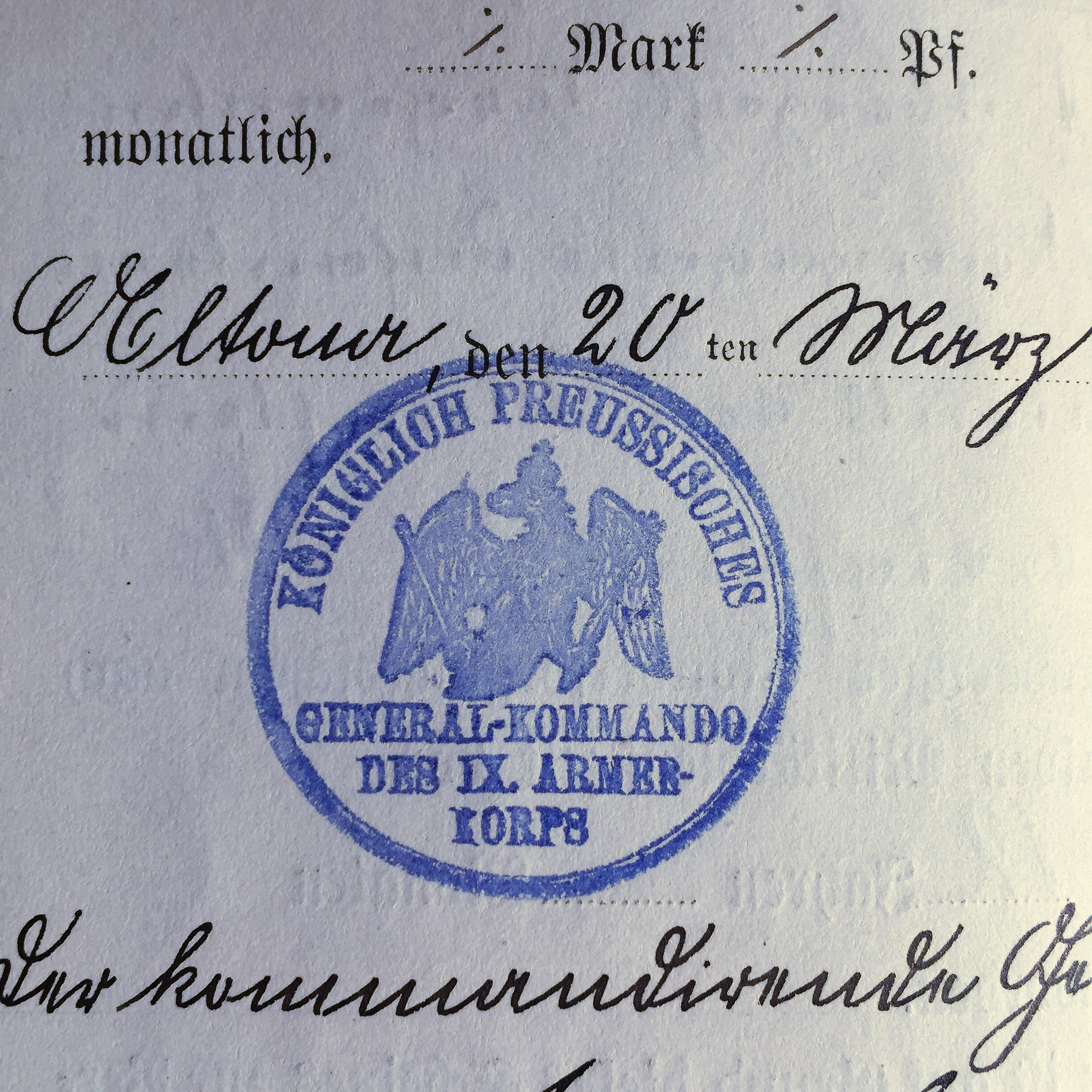 Dienstsiegel des IX. Armeekorps, Altona